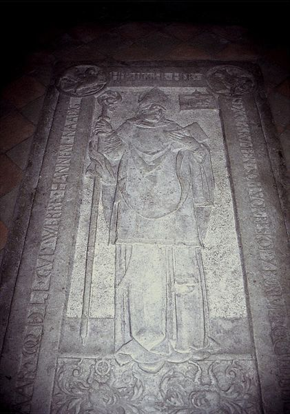 Mariager klosterkirke i Danmark. Gravsten over Stygge Krumpen